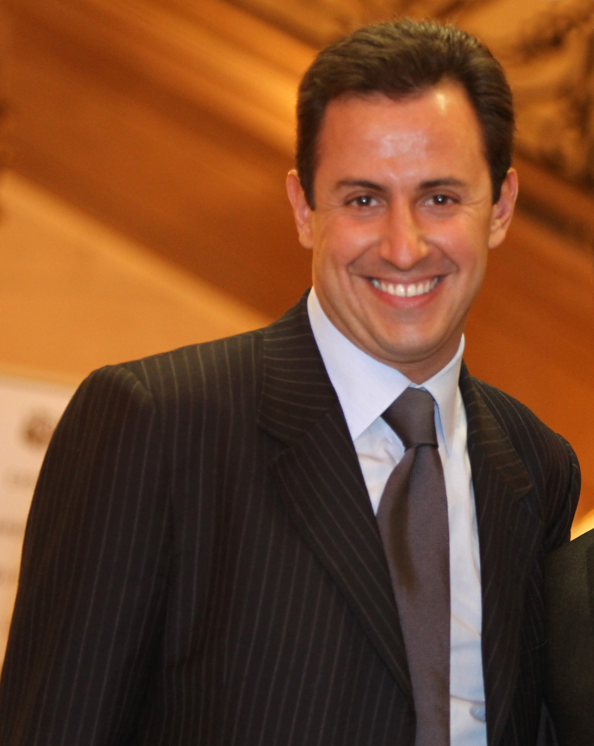 Photo de profil de Julien Balkany